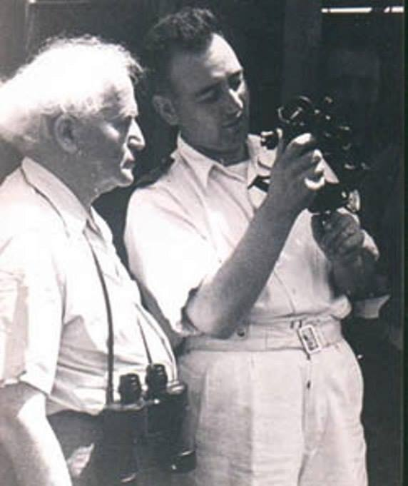 ראש הממשלה דוד בן גוריון מבקר בחיל הים ומקבל הסבר לפעולת הסקסטנט ממפקד חיל הים פול שולמן